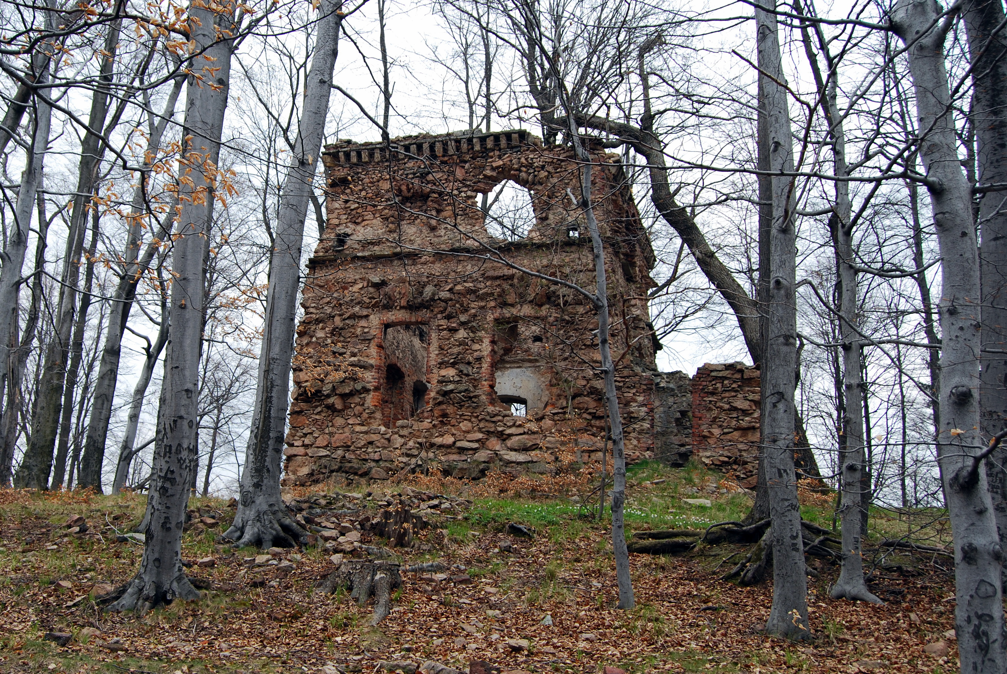 Kowary Ciszyca - wieża widokowa w parku pałacowym (zabytek nr A/2177 z dn. 23.04.10)